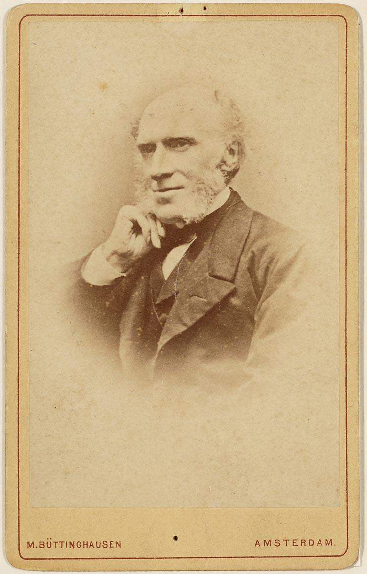 Pieter Jacob Andriessen (1815-1877) was een Nederlands schrijver en onderwijzer.